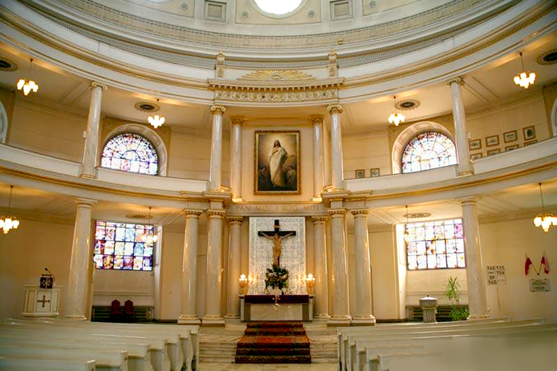 Warszawa (Polska)